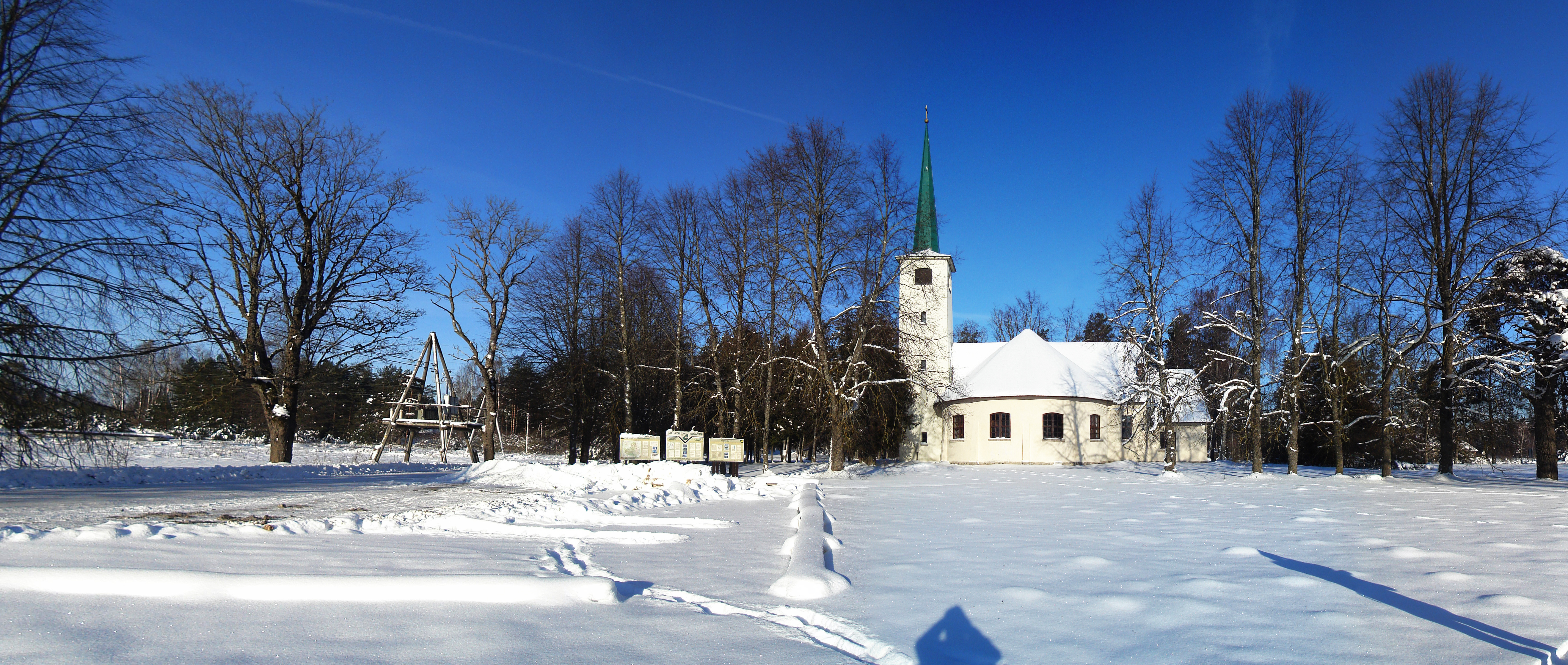 Luterāņu baznīca Allažos